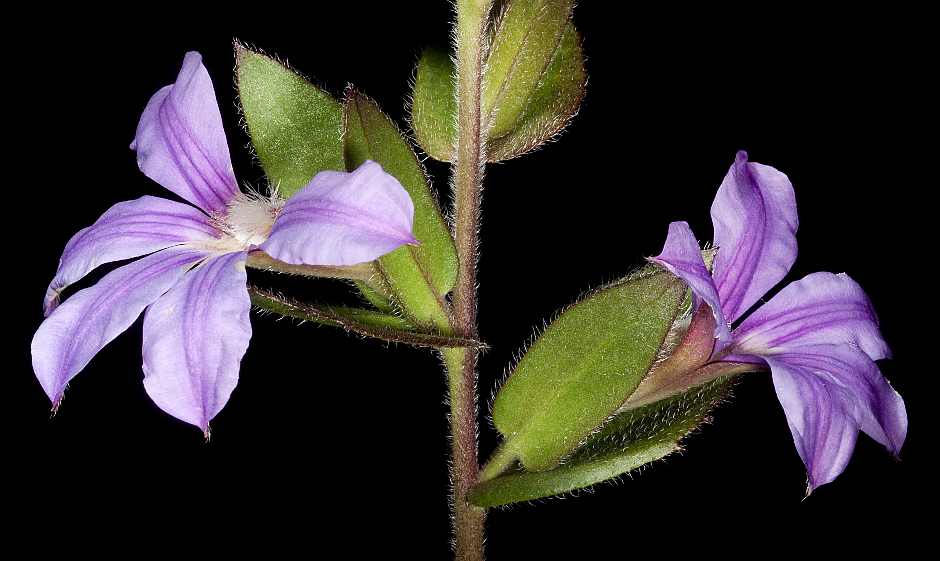 KRT4051